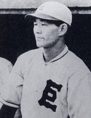 読売ジャイアンツの沢村栄治投手。1943年撮影